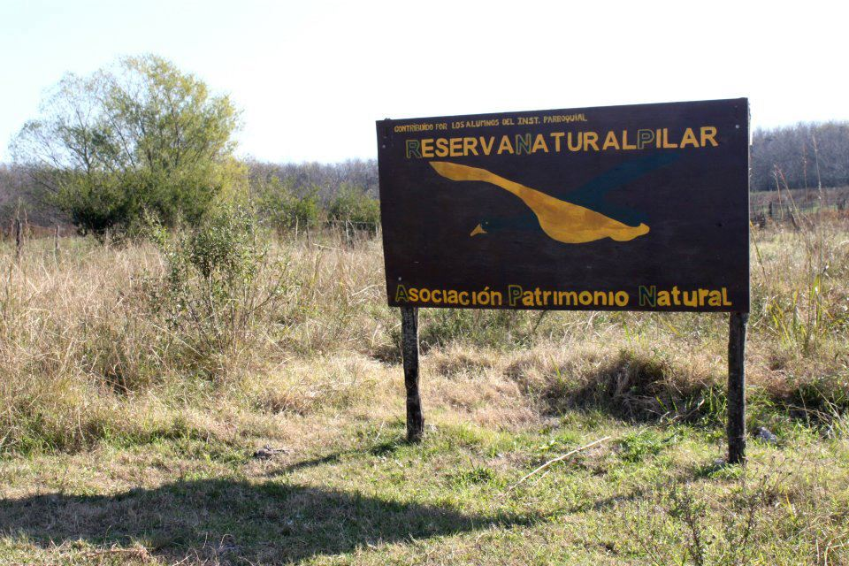 Reserva Natural de Pilar